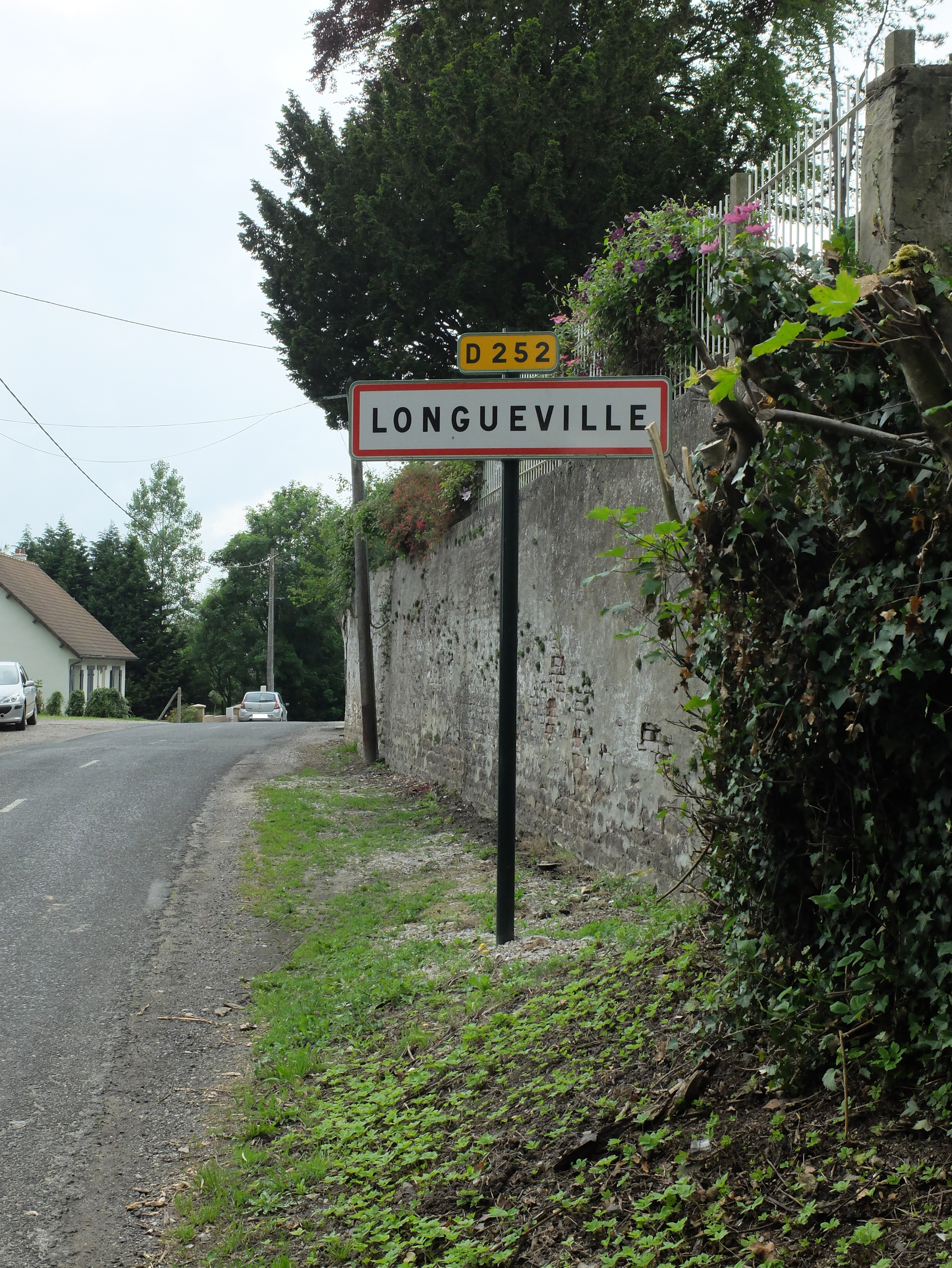 Vue d'une entrée de la commune de Longueville (Pas-de-Calais).